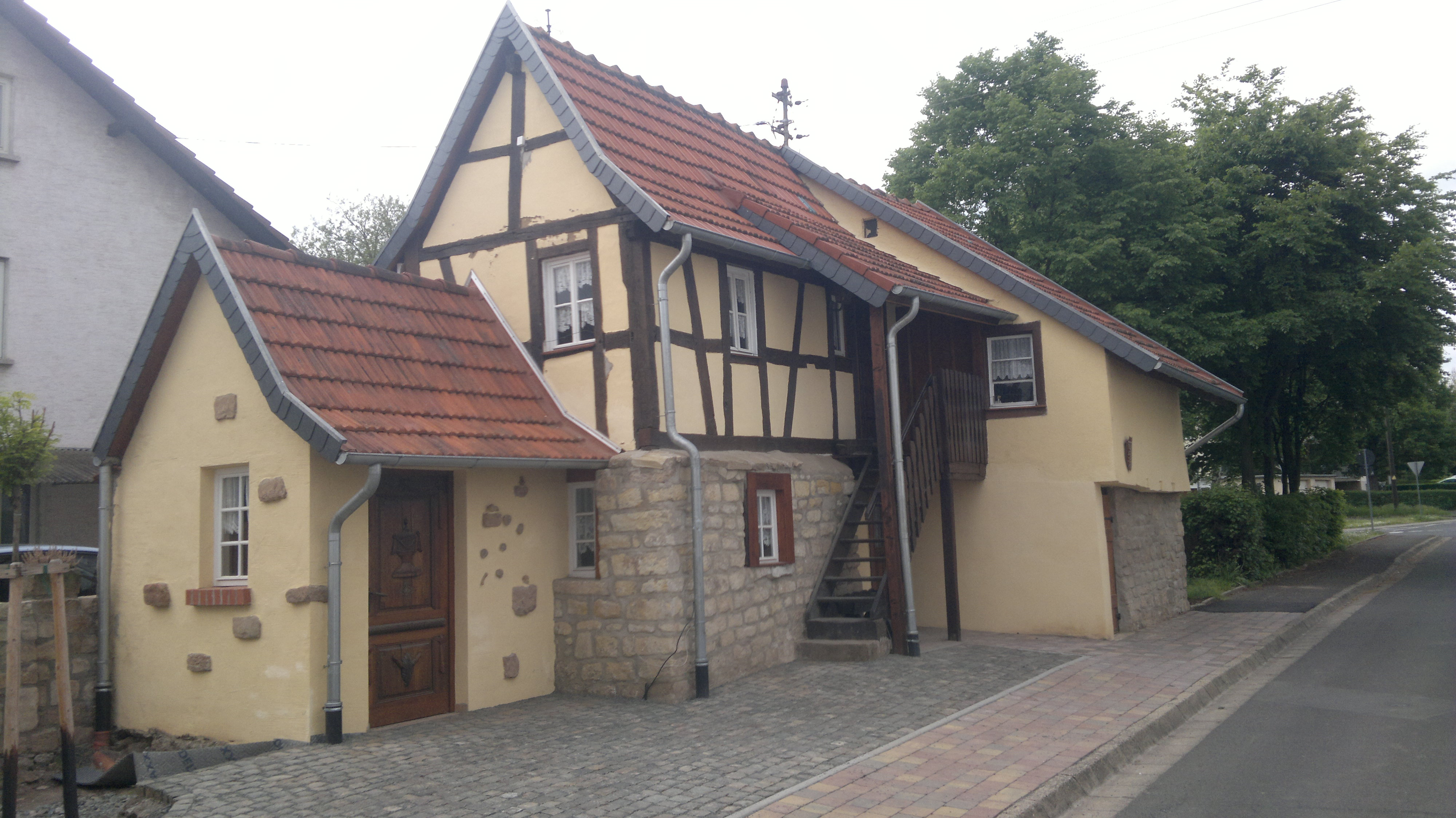 ehem. Pförtnerhäuschen in der Bad Sobernheimer Wilhelmstraße. Blick von innerhalb der Stadtmauer